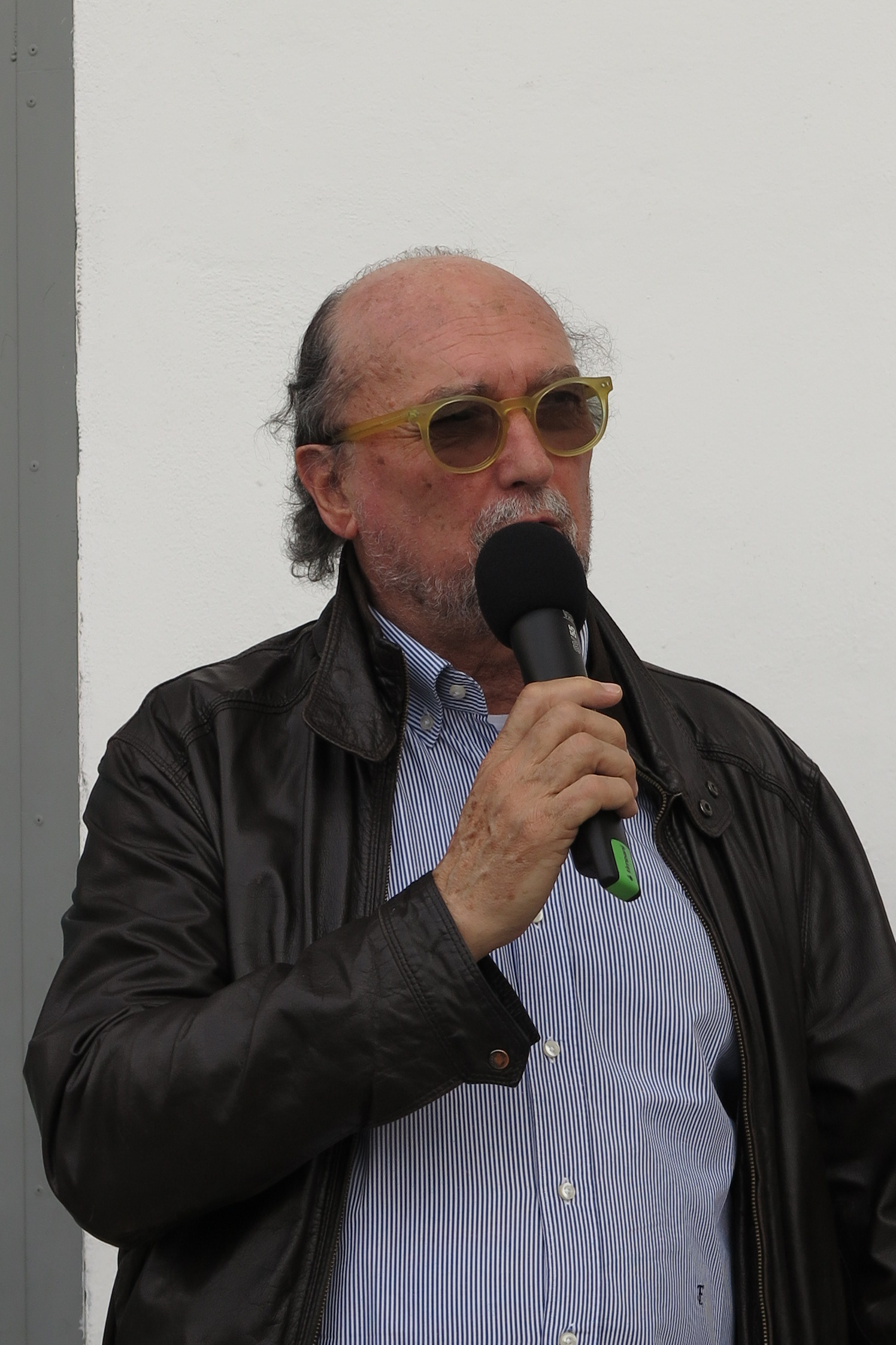 Presidente dell'Associazione internazionale della stampa sportiva